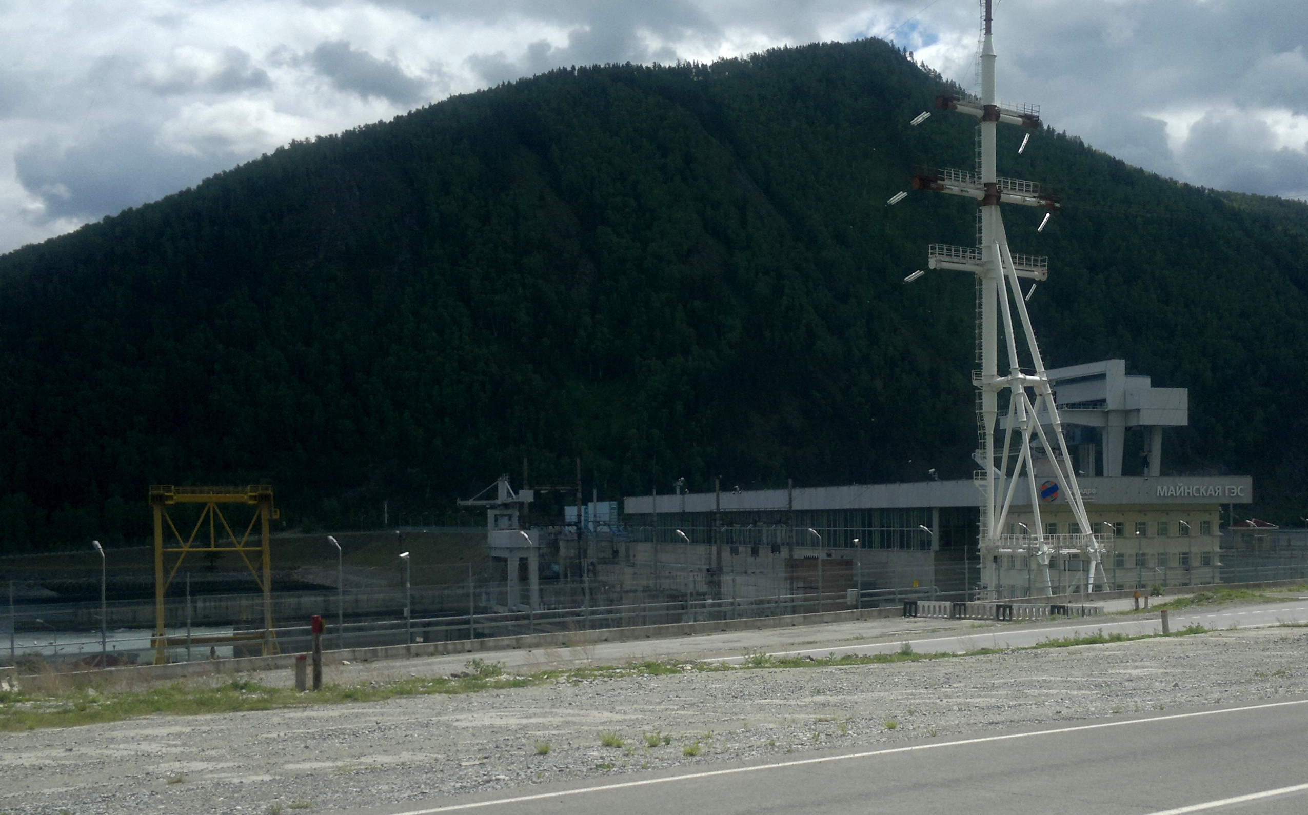 Майнская ГЭС, вид с автодороги